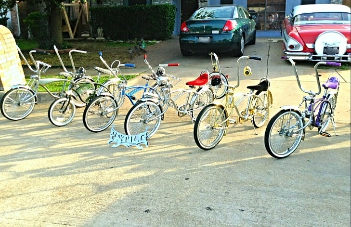 Estilo Lowrider Bike Club